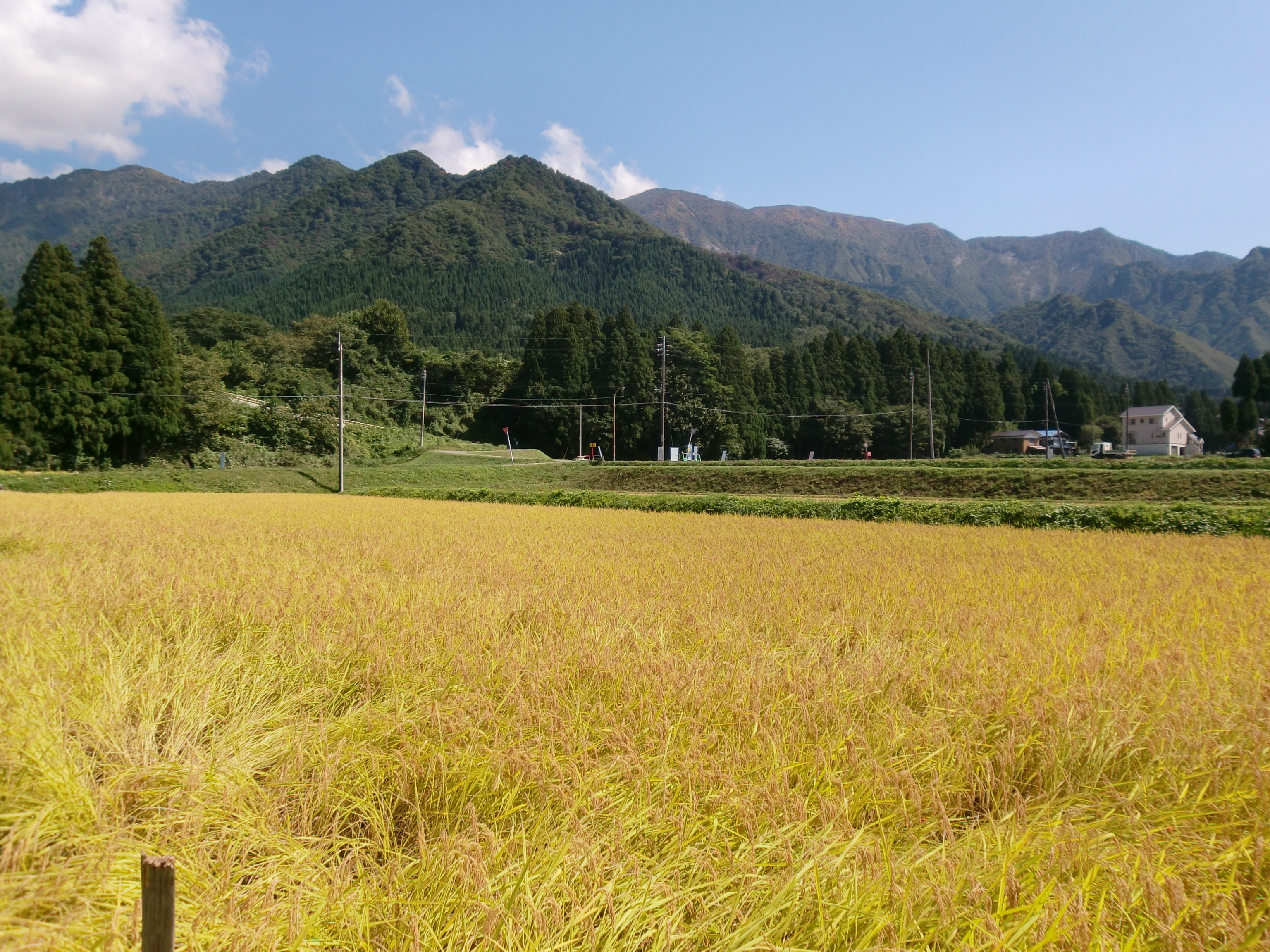 標高300m栽培地帯